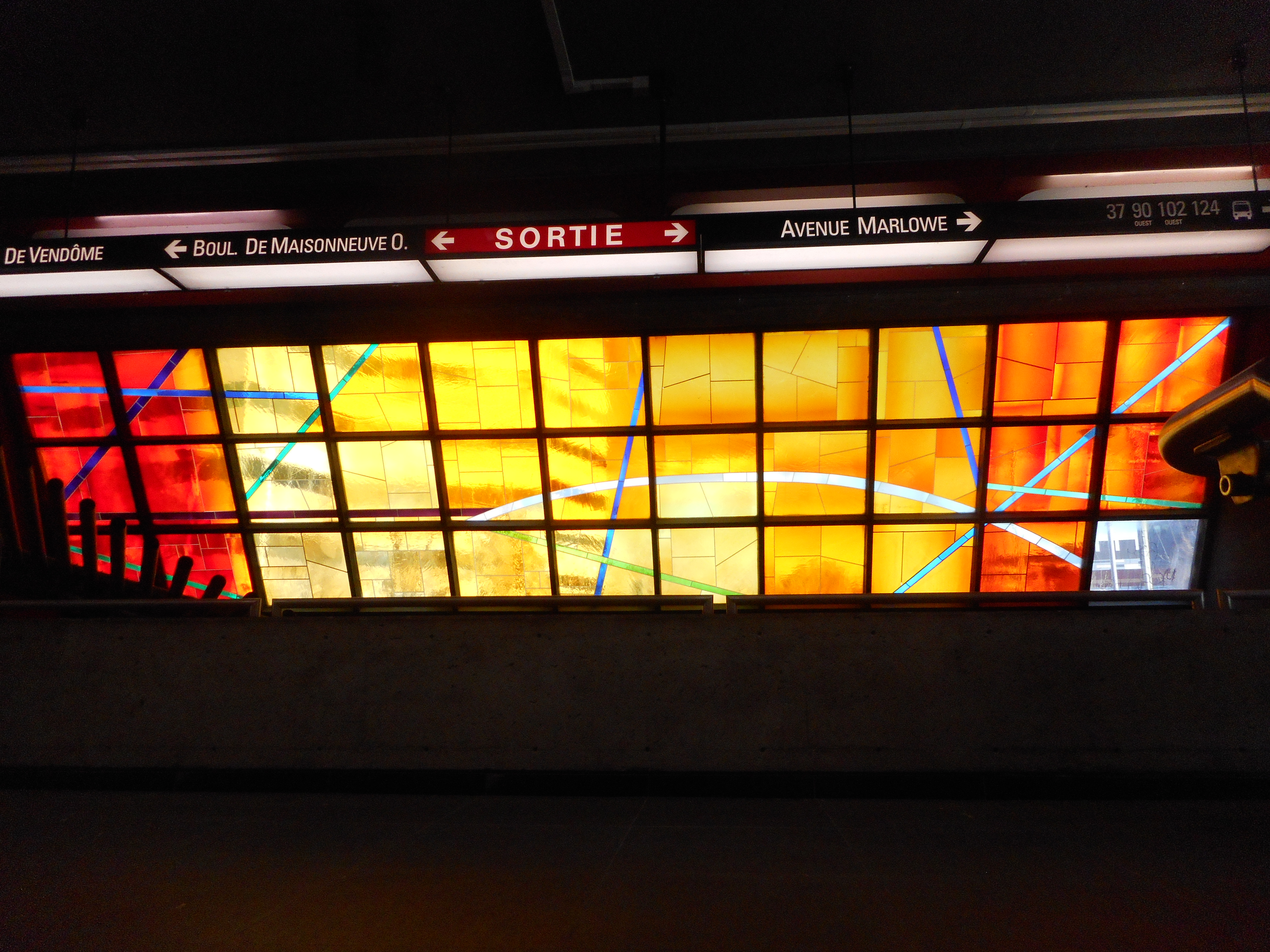 Intérieur de la station Vendôme du métro de Montréal